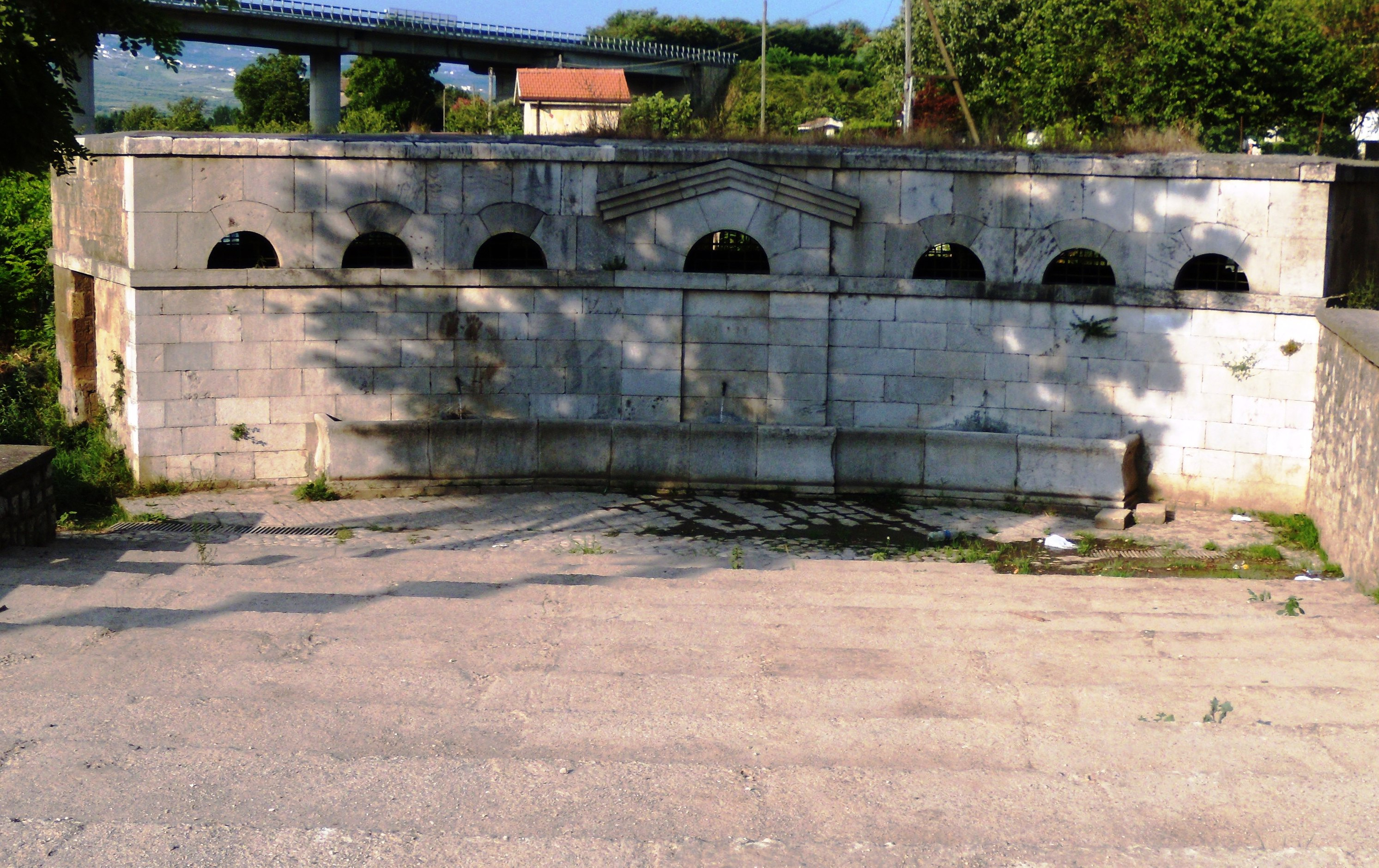 Fontana della Sala a Solopaca (Bn-Italia).